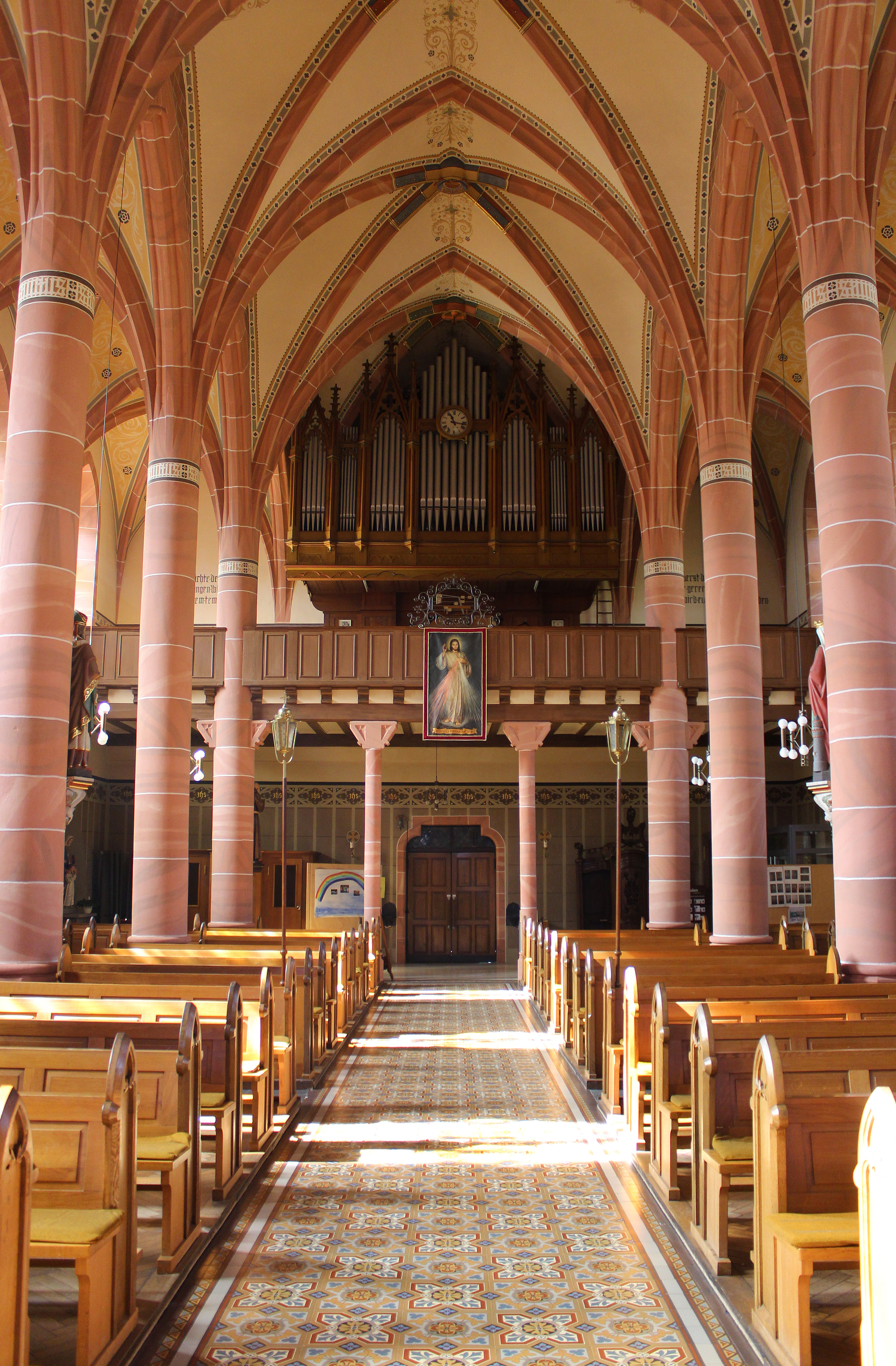 Blick ins Innere der katholischen Pfarrkirche St. Johannes und Paulus in Beckingen, Landkreis Merzig-Wadern, Saarland